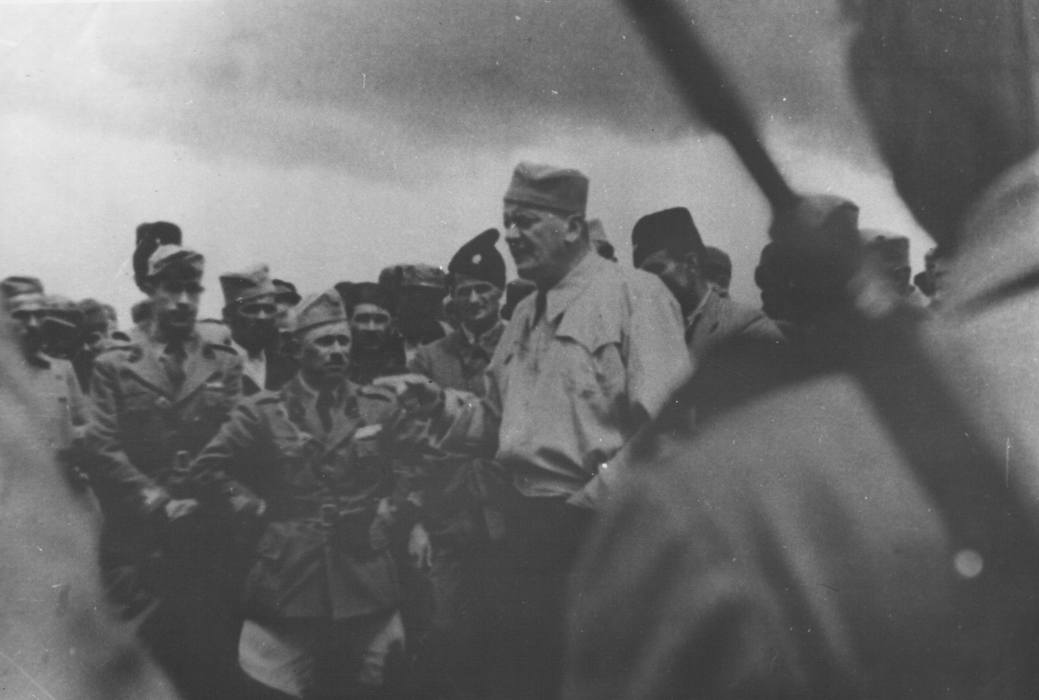 Srpskohrvatski / српскохрватски: Hercegovački četnički vojvoda Dobroslav Jevđević u prisustvu italijanskih oficira, poziva narod u borbu protiv partizana.